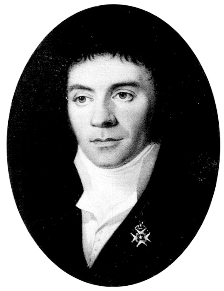 Axel Gabriel Silfverstolpe (1762-1816)